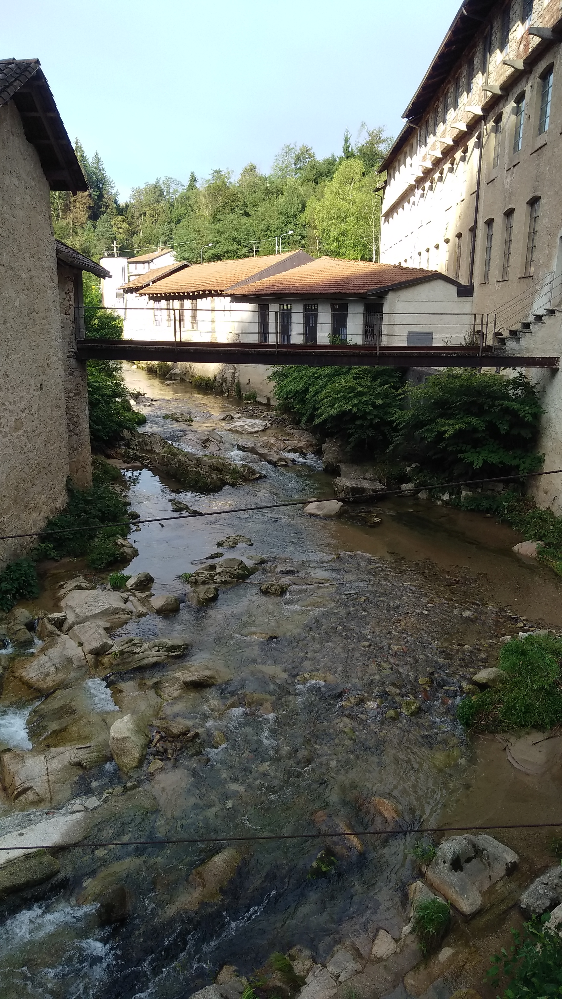 Pray: la Fabbrica della Ruota (ex lanificio Zingone) e il torrente Ponzone